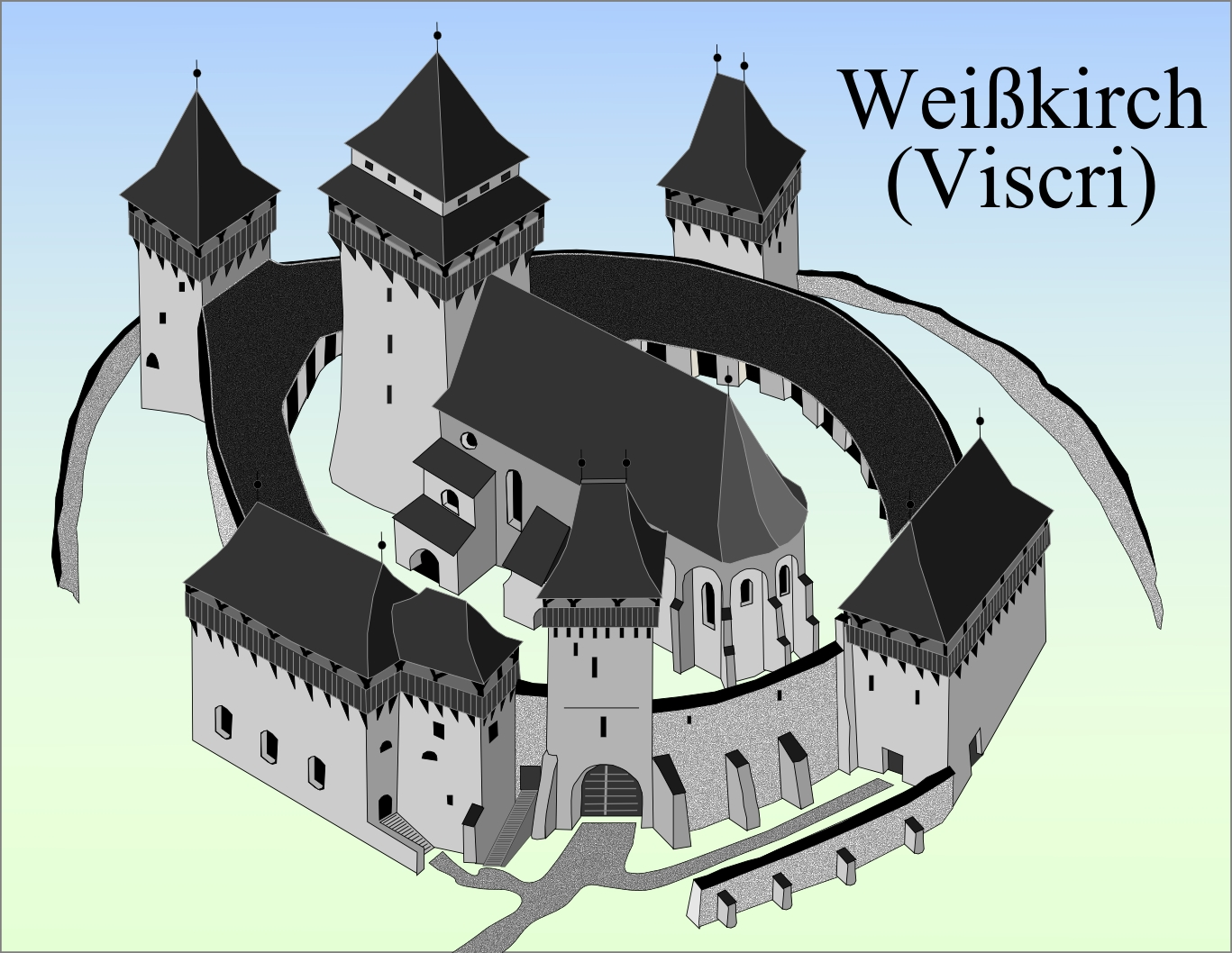 Biserica fortificata din Viscri v1